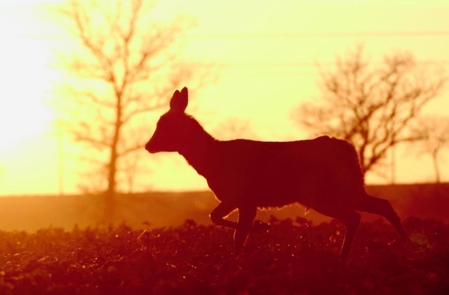 Auteur : Sylvain HAYE Prise en Lorraine, à proximité de Nancy